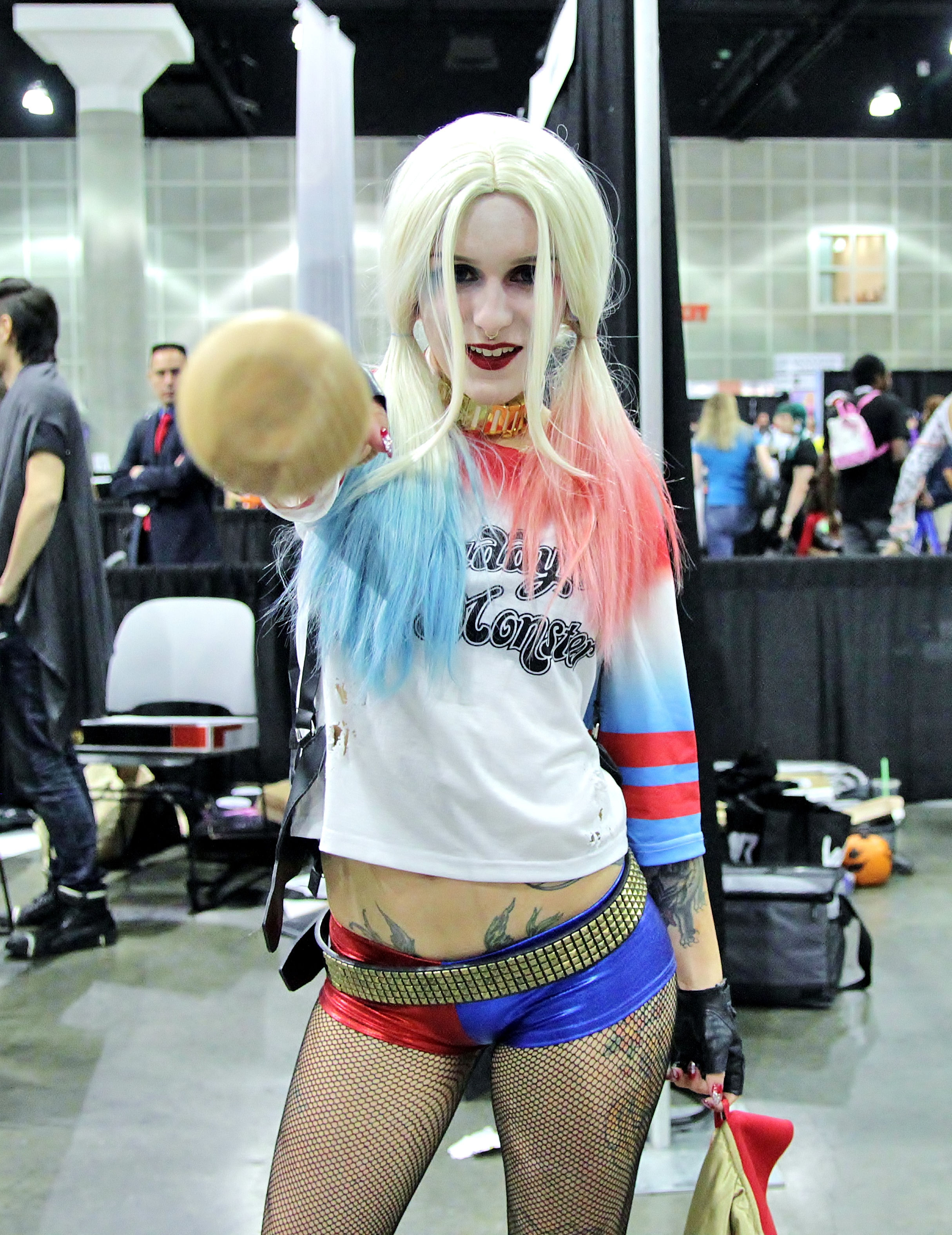 Cosplay at Comikaze Expo 2015.